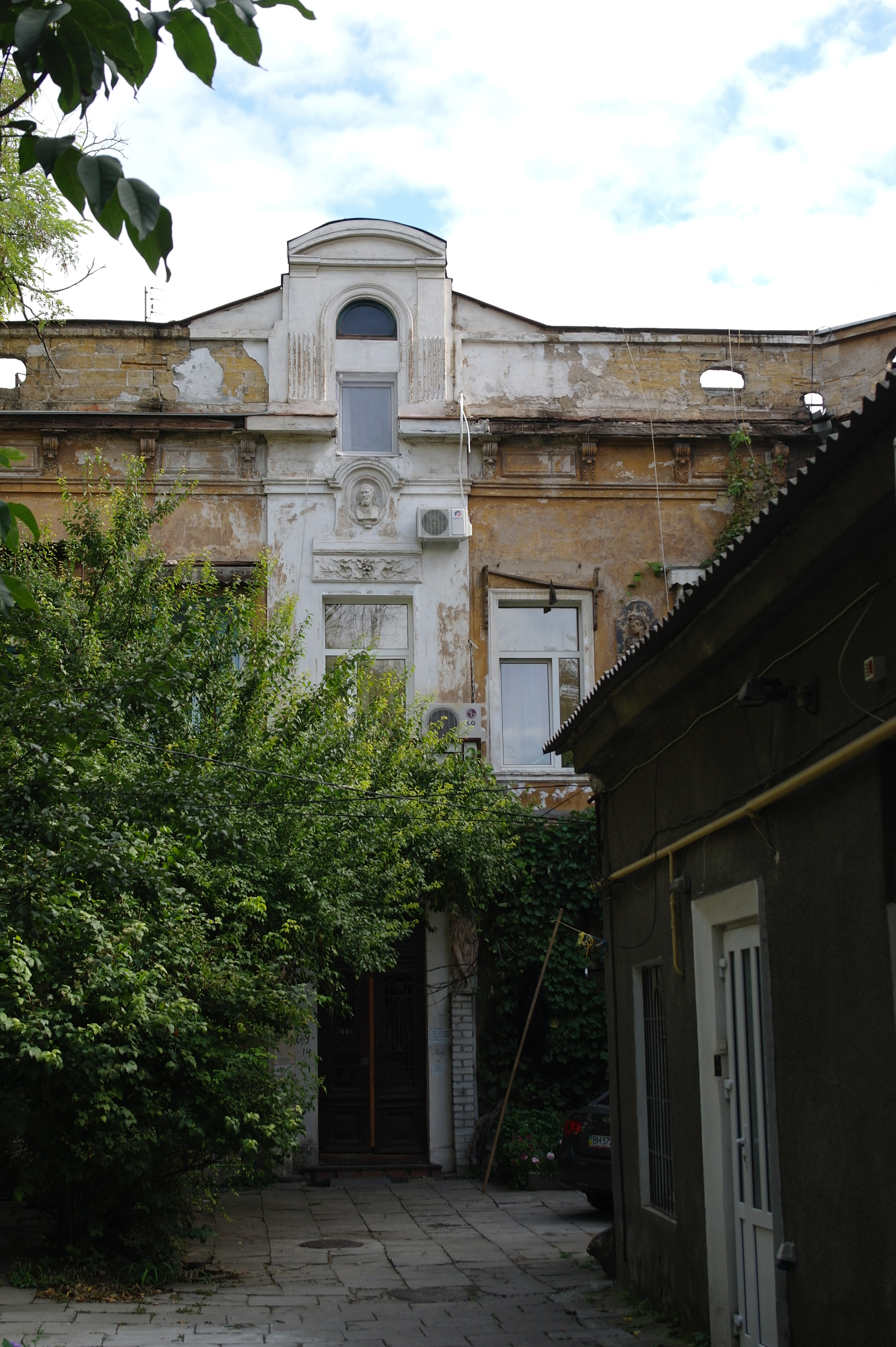 Одеса, Софіївська, 21